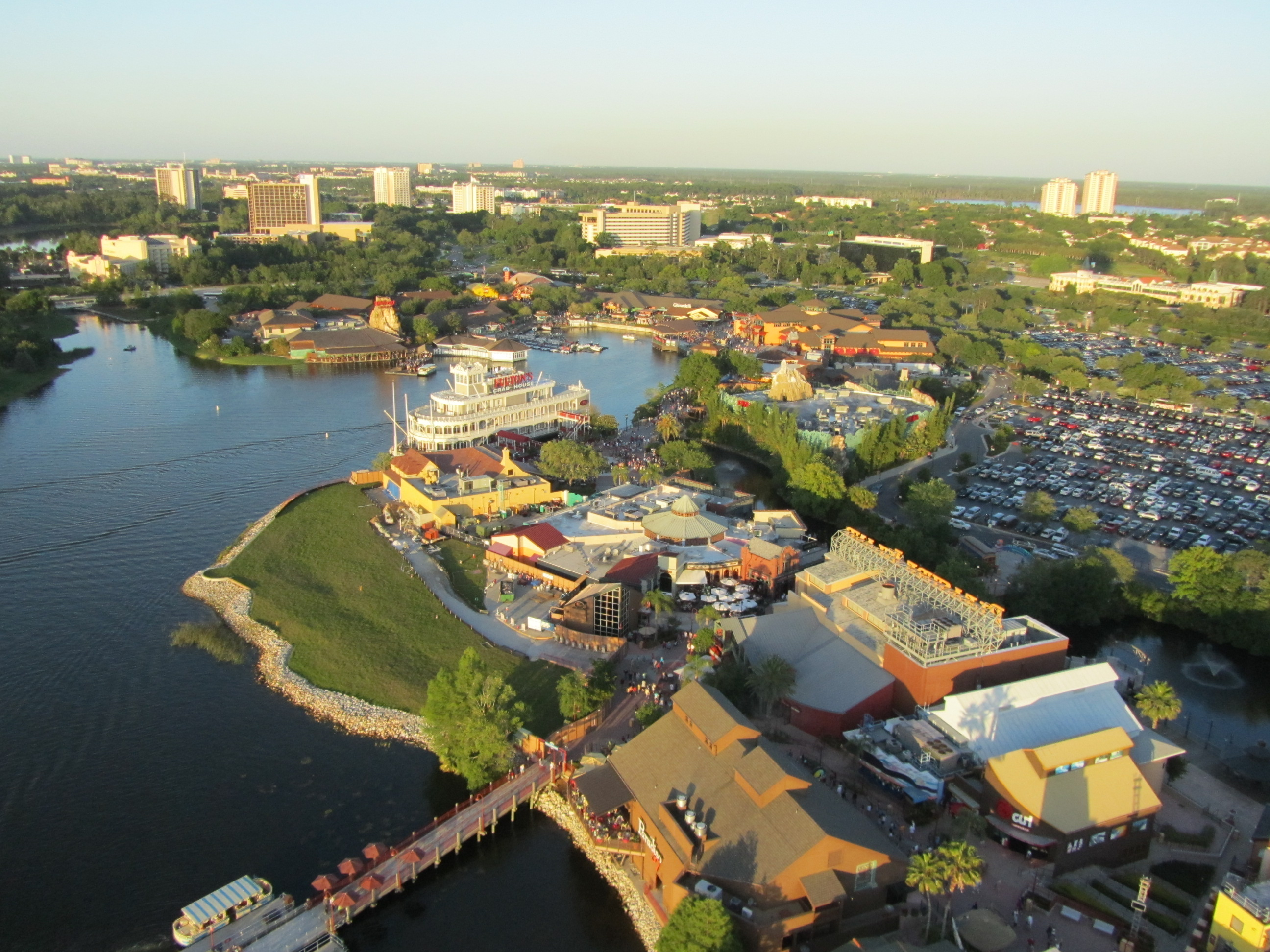 Orlando, Florida